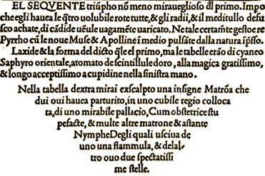 Página del Hypnerotomachia Poliphili de Francesco Colonna, impreso por Aldus Manutius